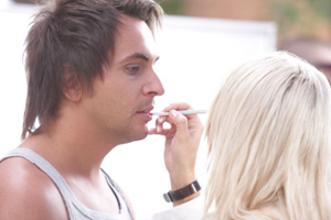 Алексей Романов. Съёмки клипа Одиночество любви